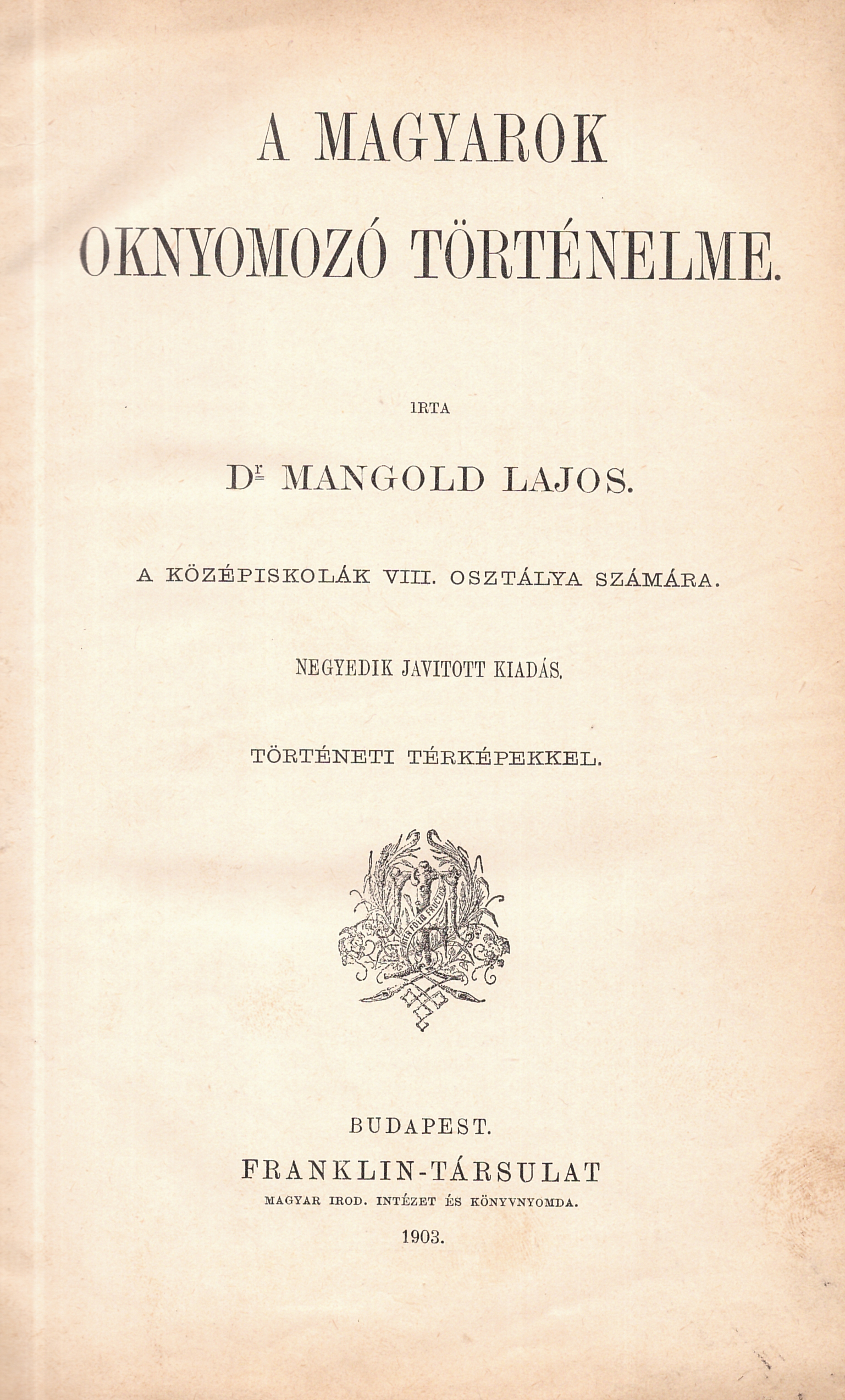 Mangold Lajos (1850-1912): A magyarok oknyomozó történelme (4. kiadás, 1903)